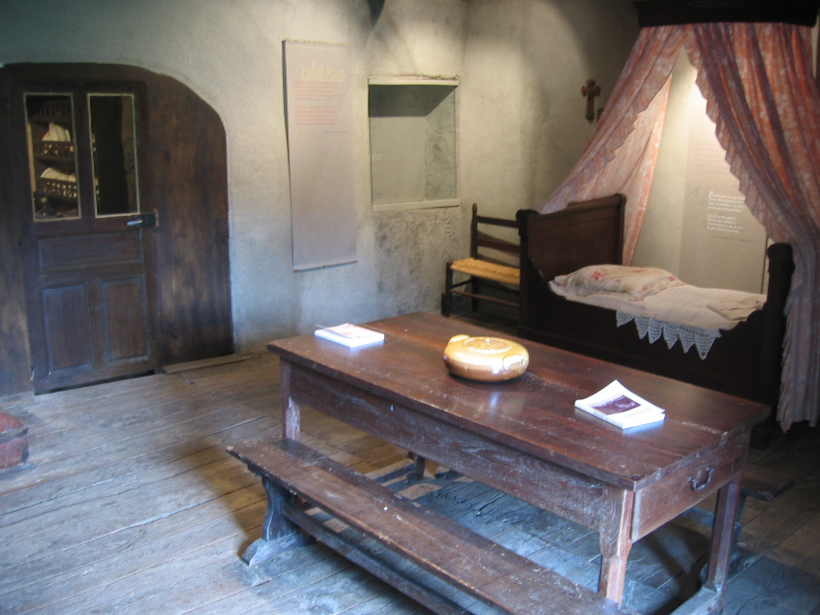 Maison natale de François Fabié (cuisine et chambre)